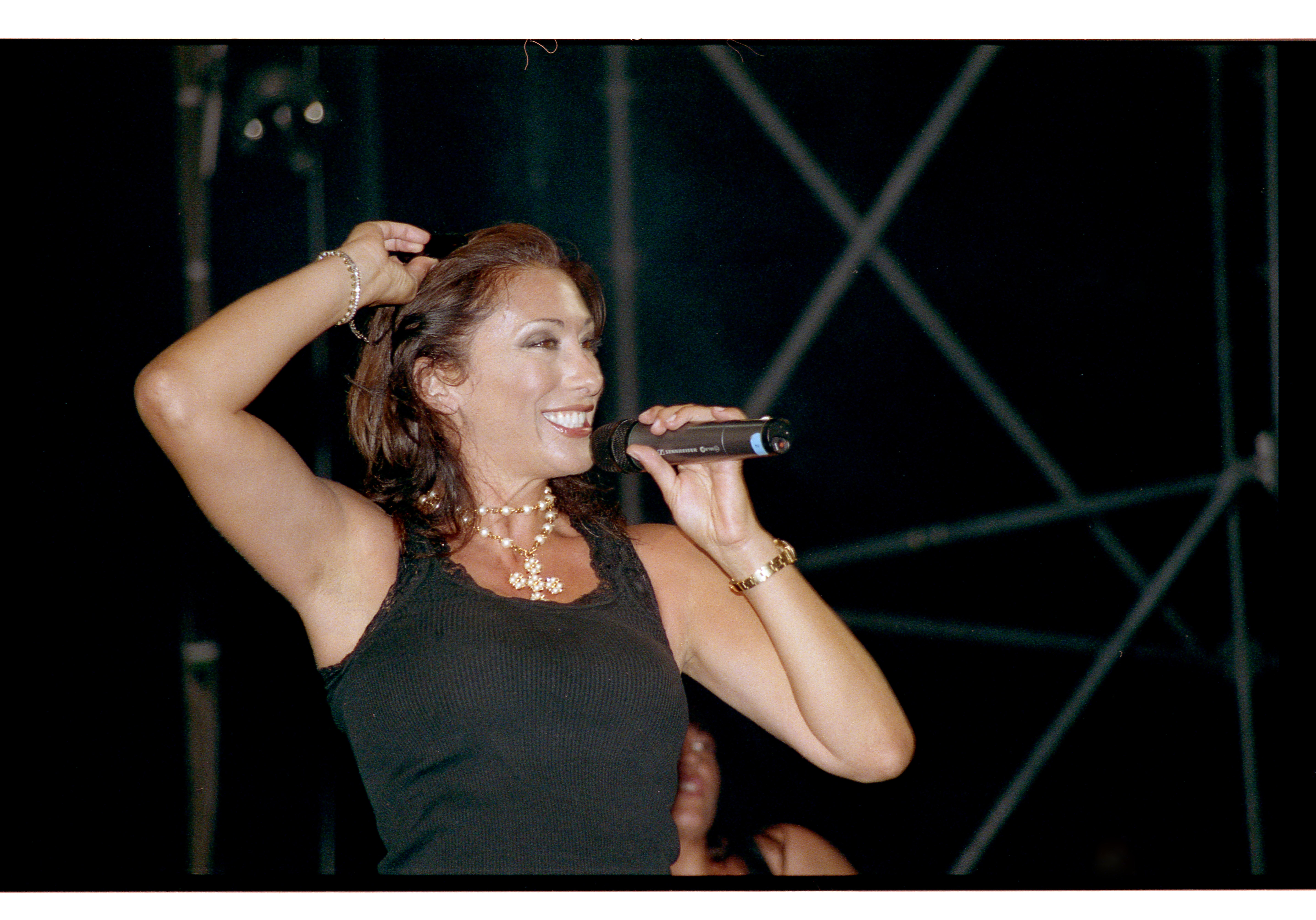 VENICE - SUMMER 2009